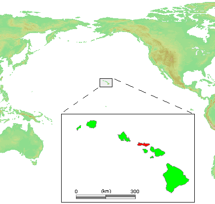 Hawaii Islands - Molokai.PNG